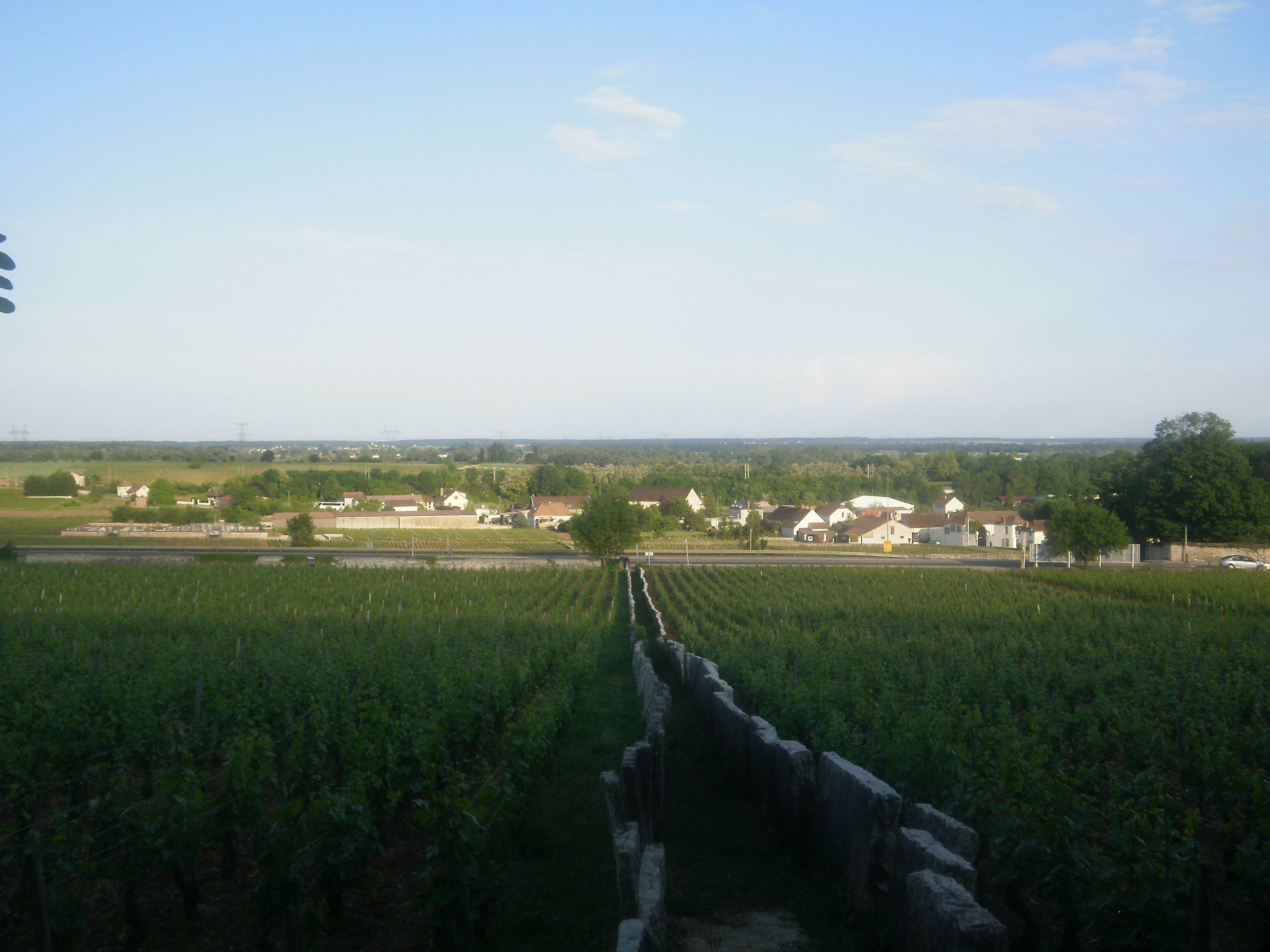 Point de vue de la partie nord du village de Premeaux-Prissey. Photo prise depuis le calvaire du Clos des Corvées (sans aucun jeu de mot).